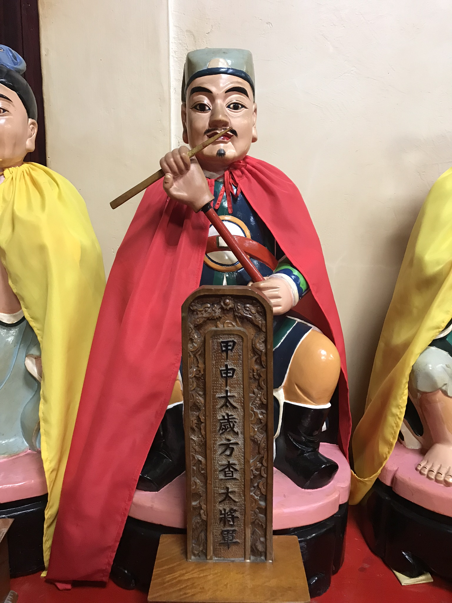 甲申太歲方傑大將軍神像